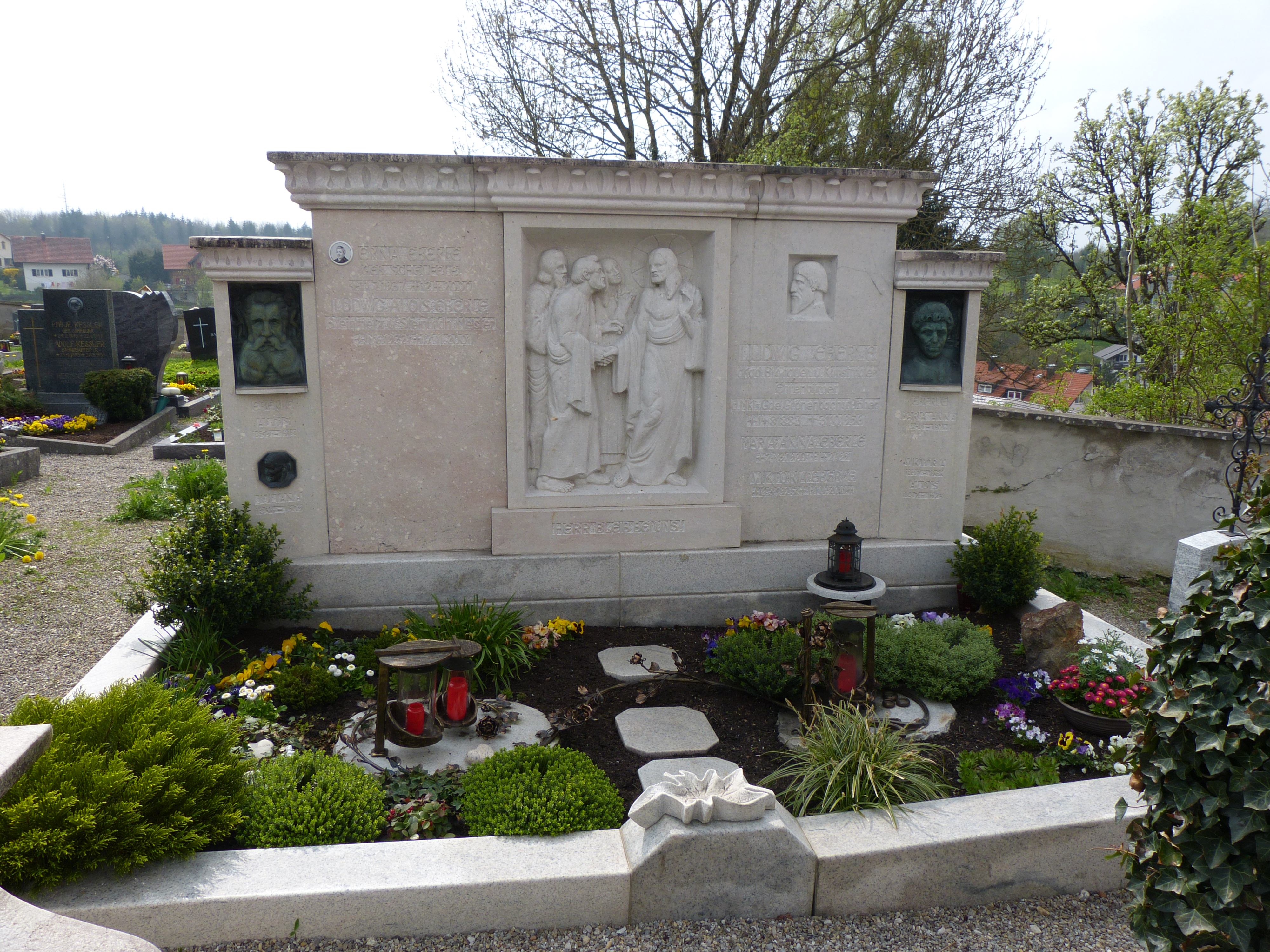 Friedhof auf dem Stiftsberg in Bad Grönenbach, Landkreis Unterallgäu, Bayern Grabstätte Familie Eberle mit Ehrenbürger Ludwig Eberle